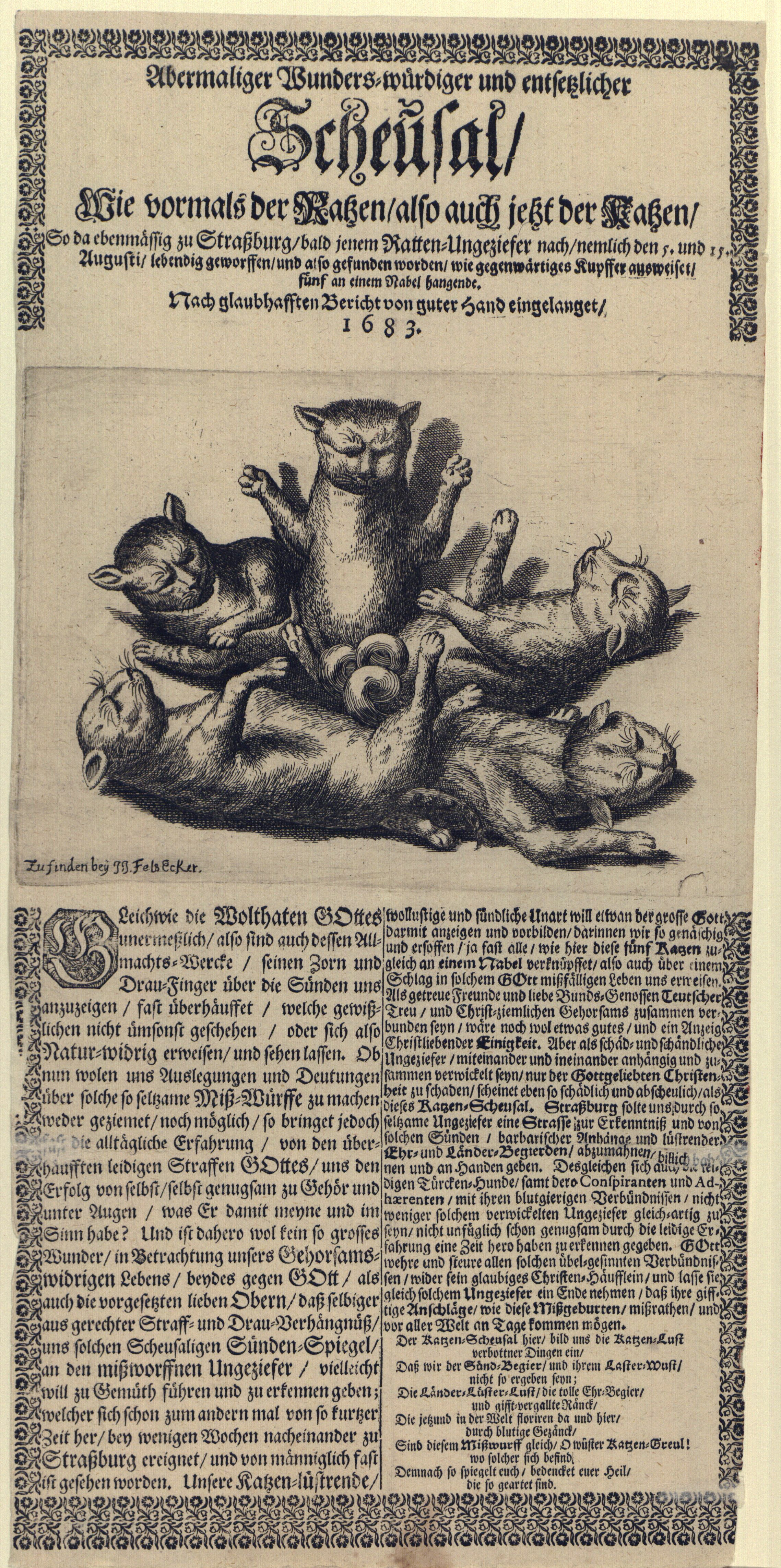 Abermaliger Wunders=würdiger und entsetzlicher//Scheusal///Wie vormals der Ratzen also auch jetzt der Katzen///So da ebenmässig zu Straßburg/bald jenem Ratten=Ungeziefer nach/nemlich den 5. und 15.//Augusti lebendig geworffen/und also gefunden worden/wie … (Katzenknäuel analog dem „Rattenkönig“). Verleger: J[ohann] J[onathan] Felsecker, [Nürnberg] 1683